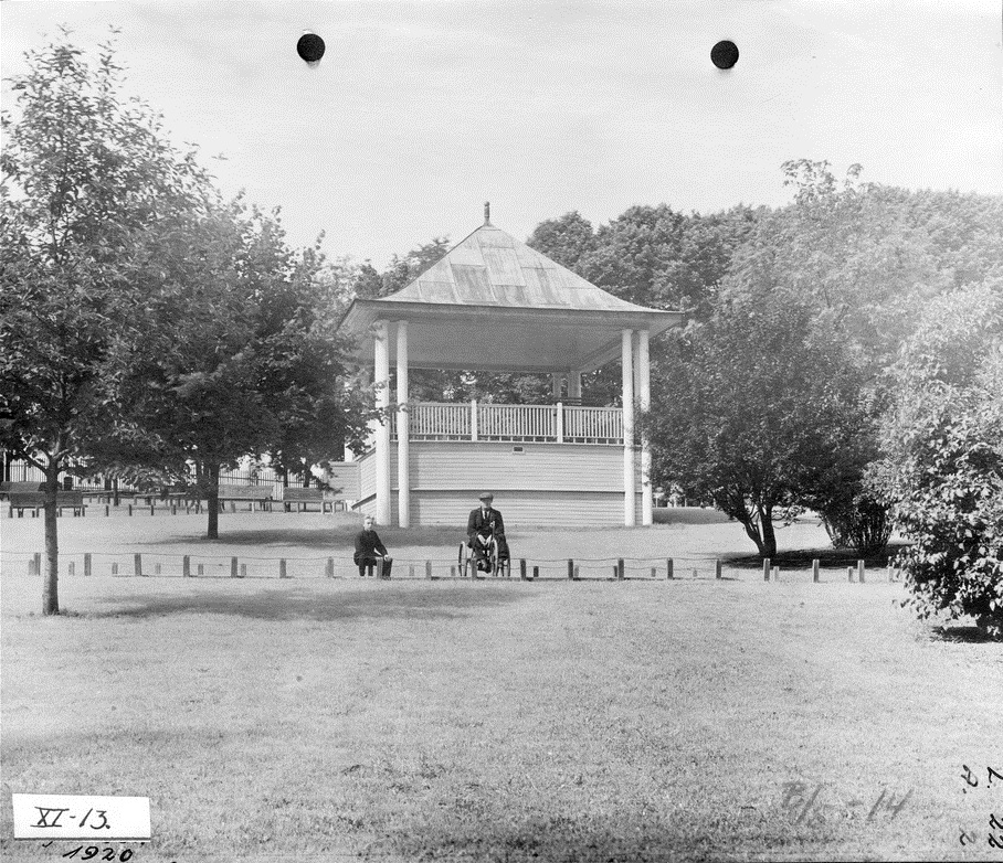 Musikkpaviljongen i Bjølsenparken. Parktrær, parkbenker og inngjerdede plener. Mann i rullestol.